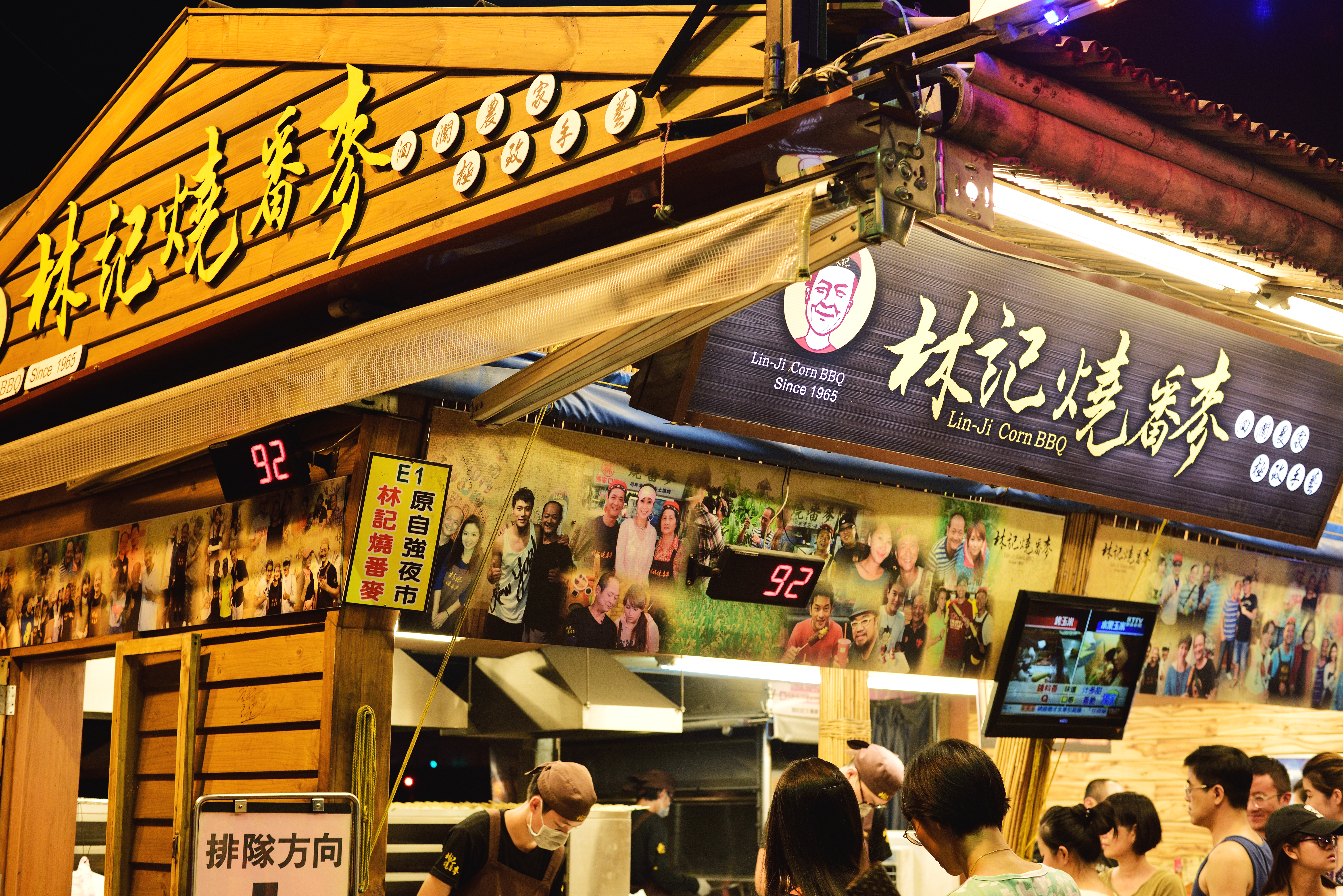 41-花蓮東大門夜市，林記燒番麥